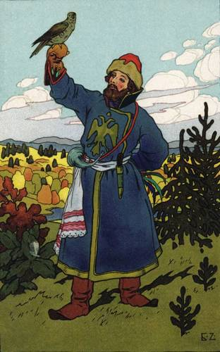 Сокол